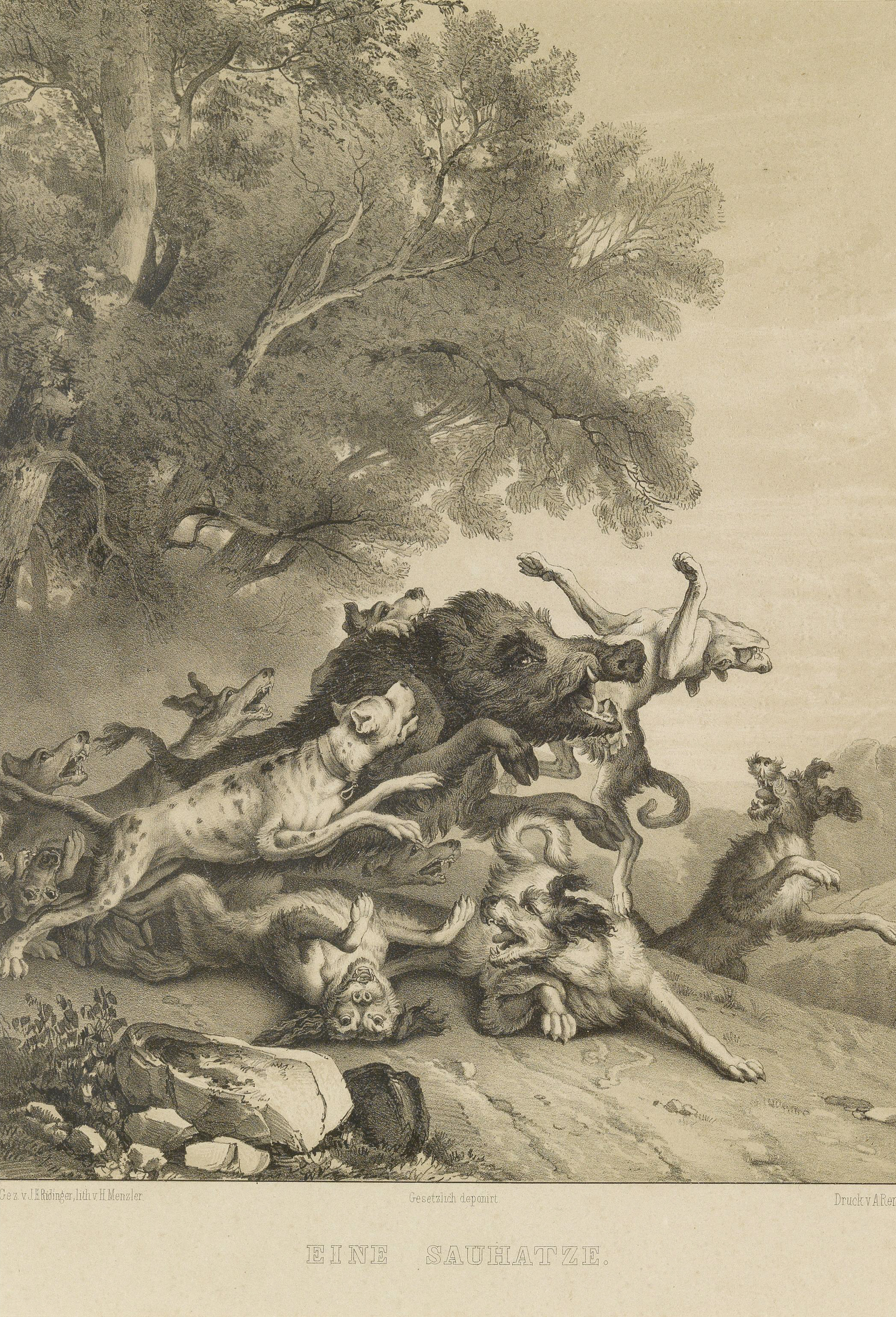 Eine Sauhatze. Lithographie aus "Johann Elias Ridingers Jagd-Album" von Hermann Menzler im Druck von A. Renaud, verlegt bei L. J. Heymann in Berlin (1863-65), "Gez. v. J. E. Ridinger, lith. v. H. Menzler etc.", ca. 35 x 23 cm